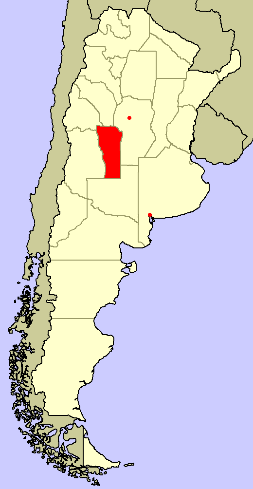 Situación de la revolución libertadora al 17 de septiembre de 1955. Mapa original: Argentina provinces, blank.png